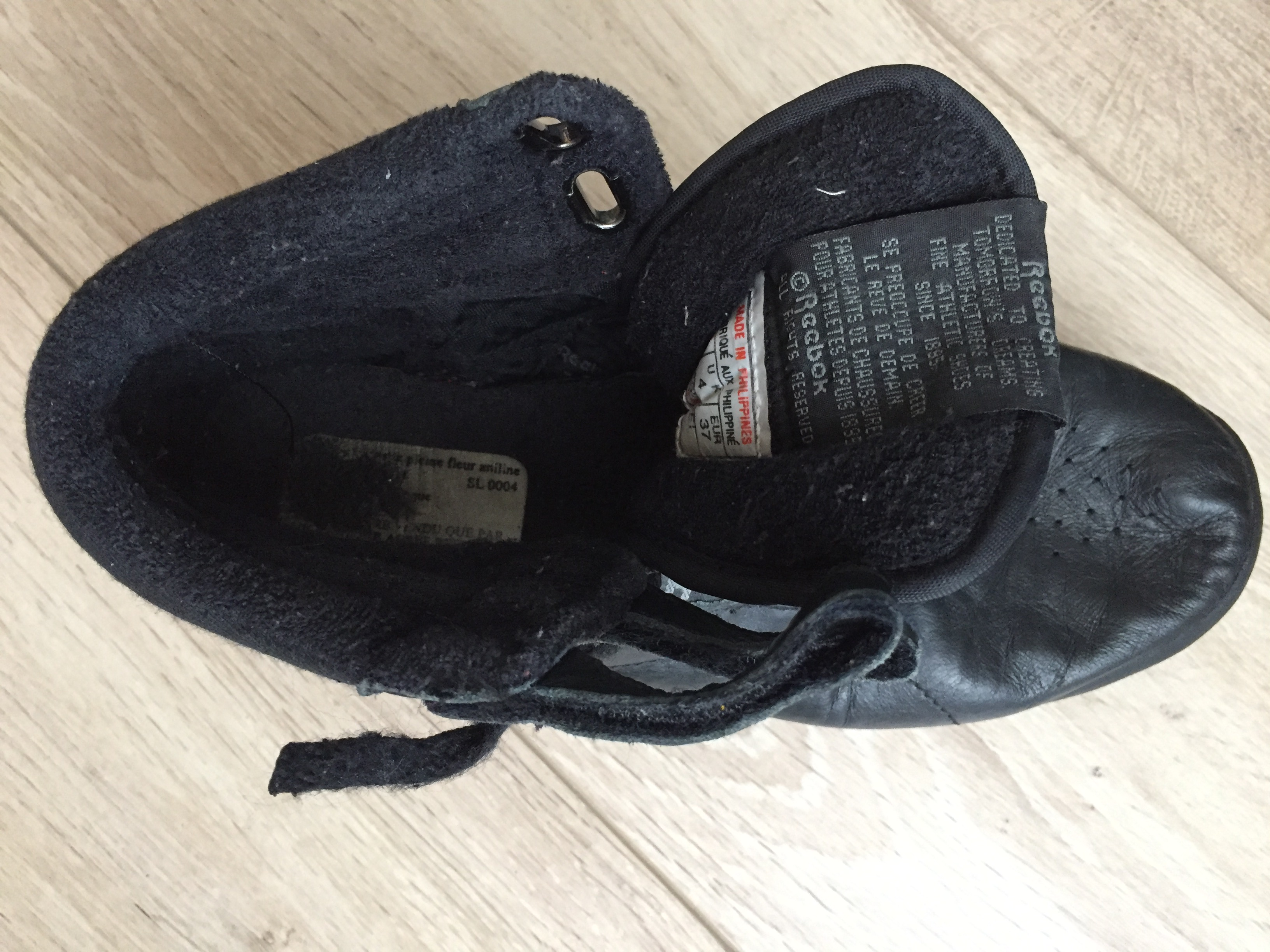 Les Reebok Freestyle made in Philippines étaient réalisées avec un cuir pleine fleur d'aniline